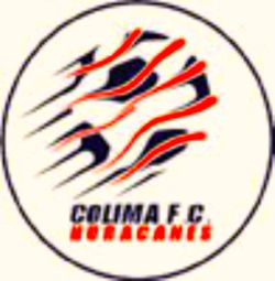 Colima Futbol Club, Huracanes de Colima (Edicion propia)